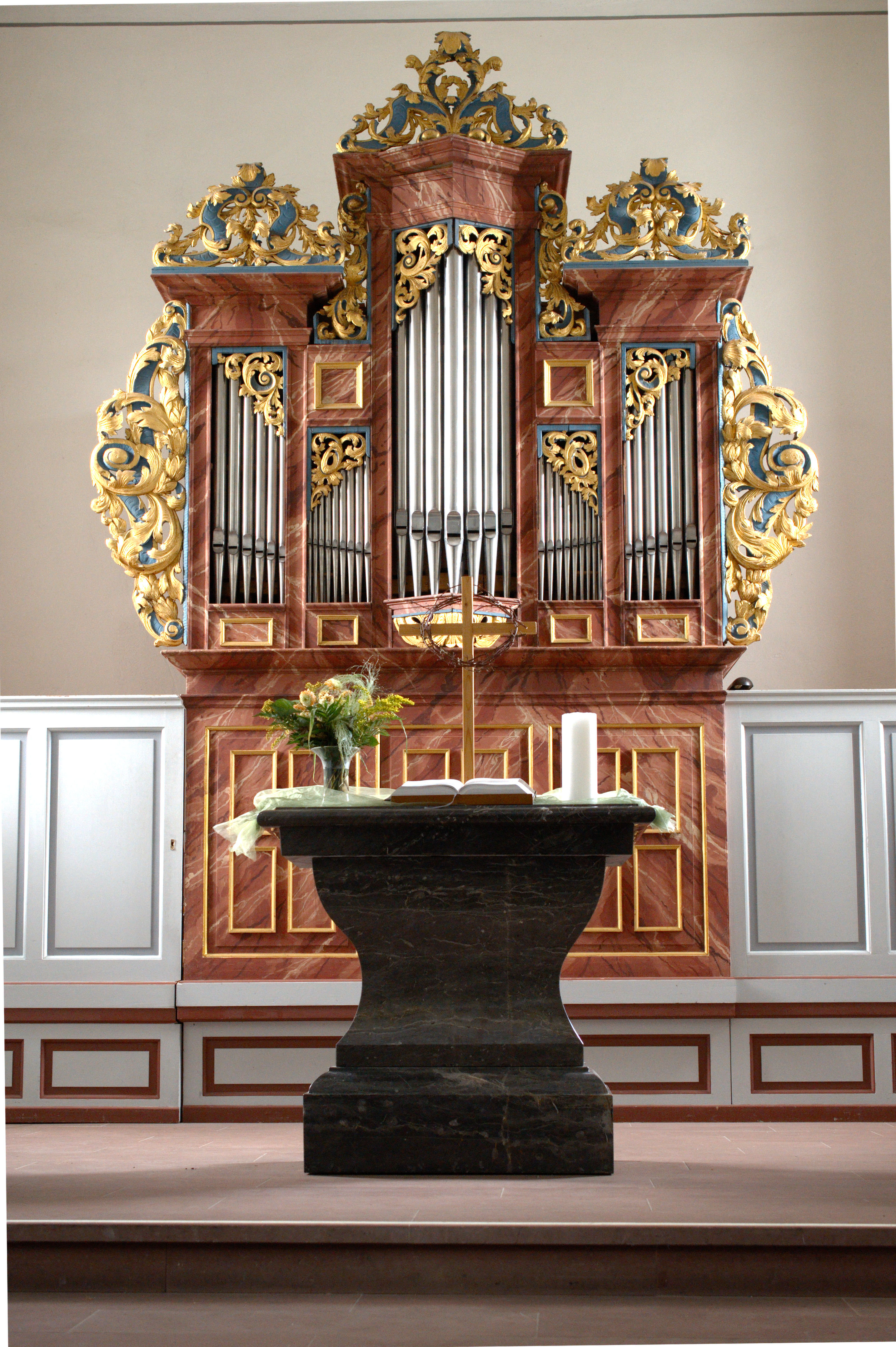 Orgel der Ev. Kirche Niederbiel, Solms, Deutschland